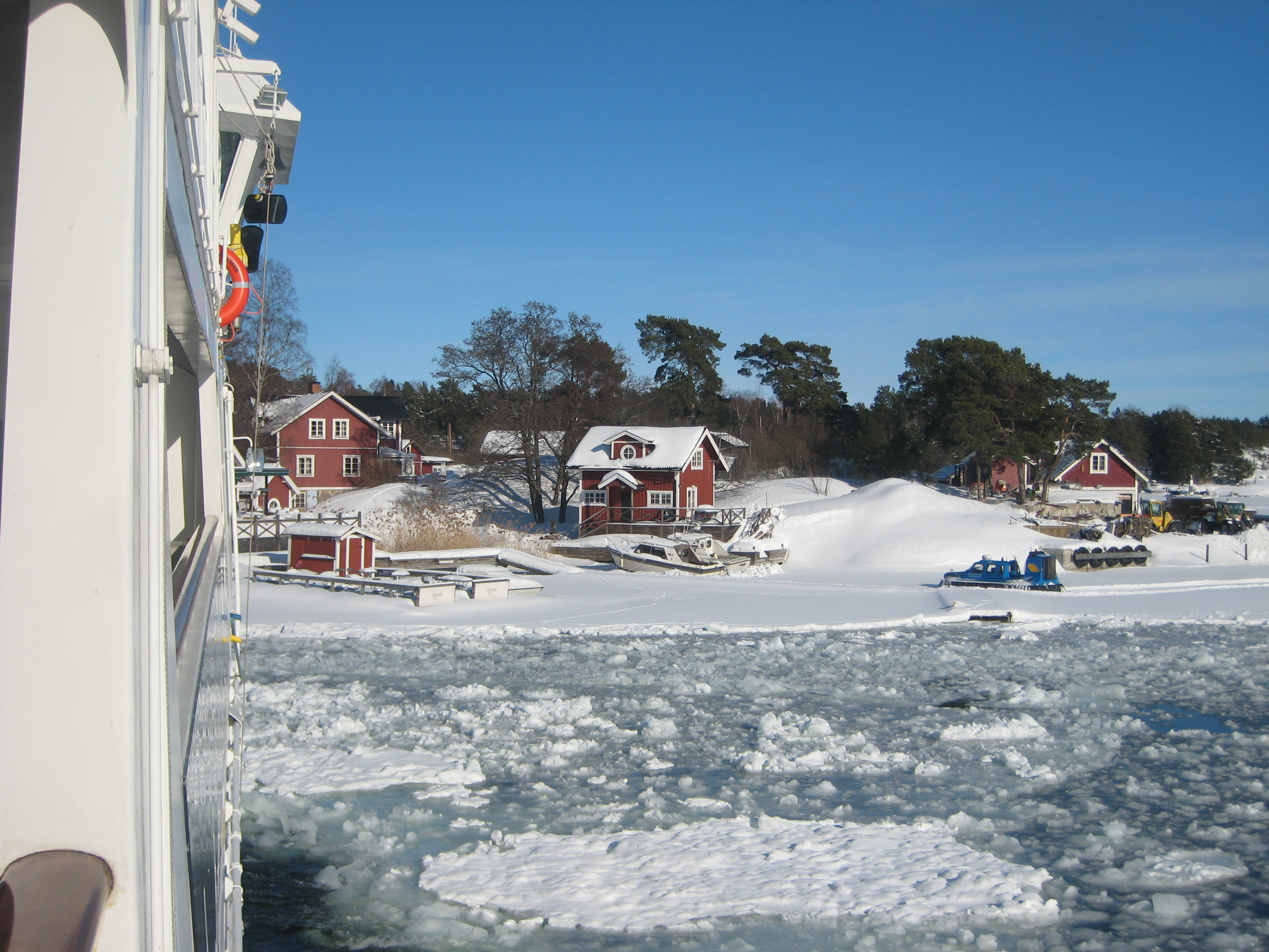 Södra Ingsmarsö, mars 2010.